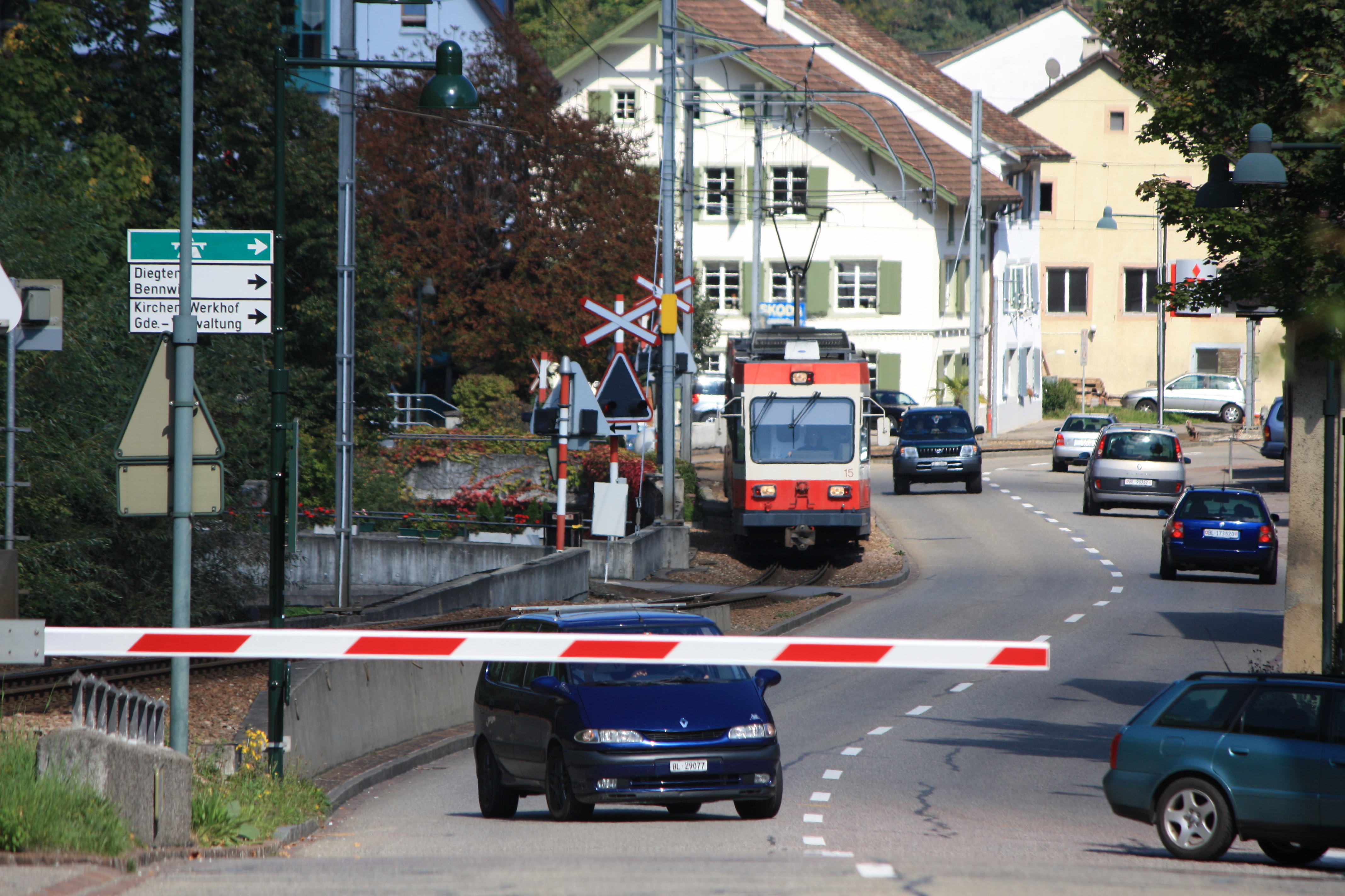 WB, BDe 4/4, Ausfahrt aus Hölstein Richtung Waldenburg